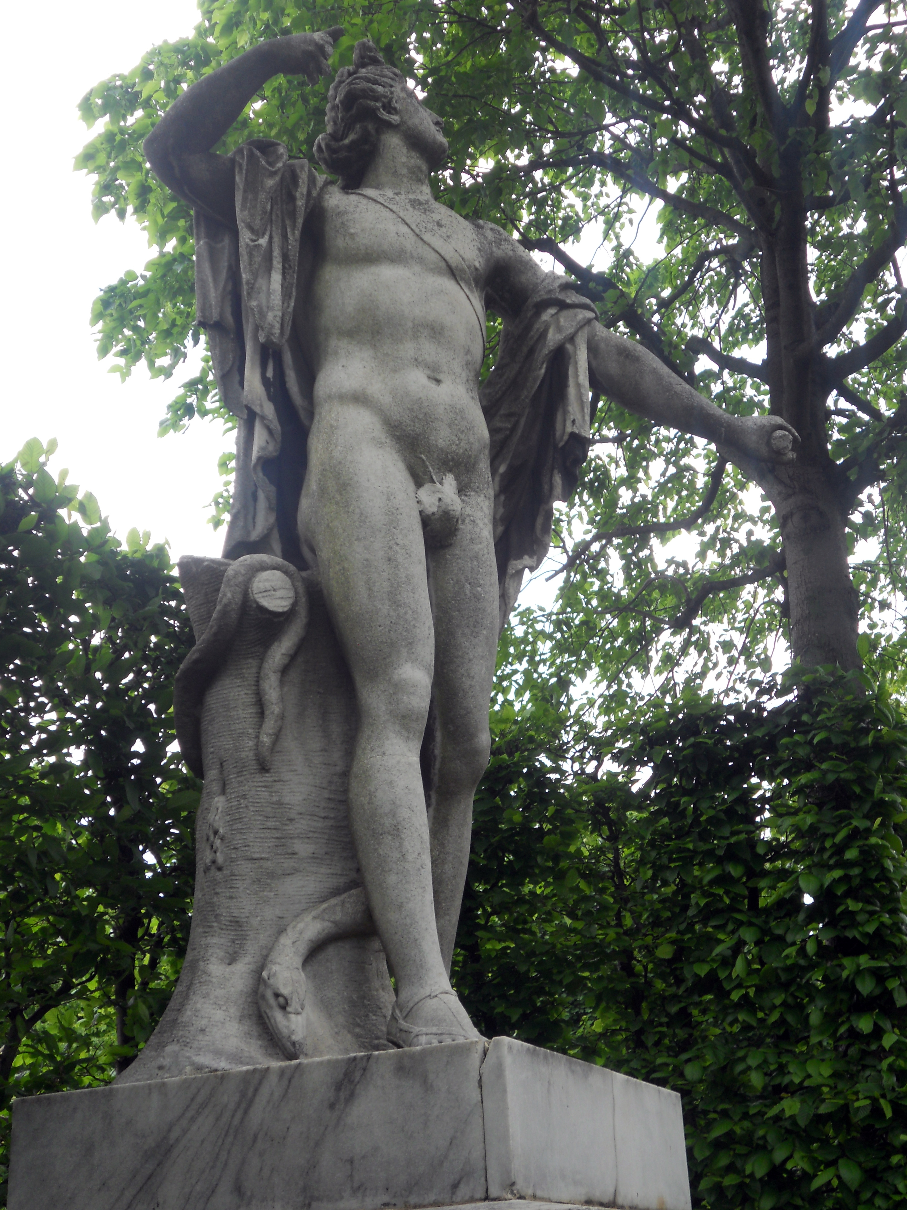 Apollo